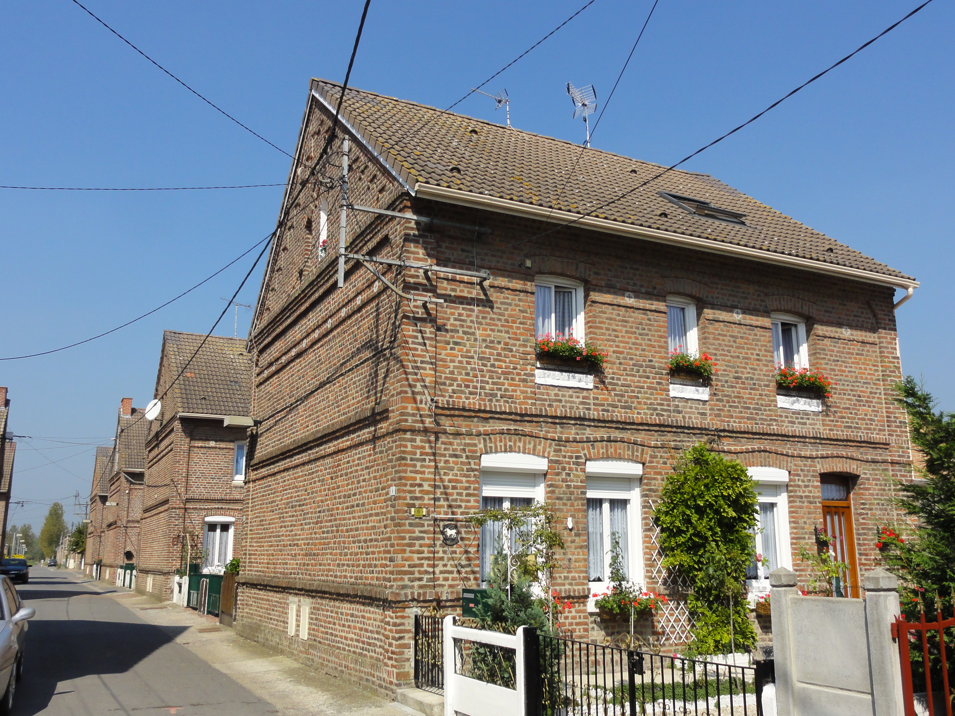 Cité Saint-Roch de la fosse Saint-Pierre de la Compagnie des mines de Thivencelle dans le bassin minier du Nord-Pas-de-Calais, Thivencelle, Nord, Nord-Pas-de-Calais, France.